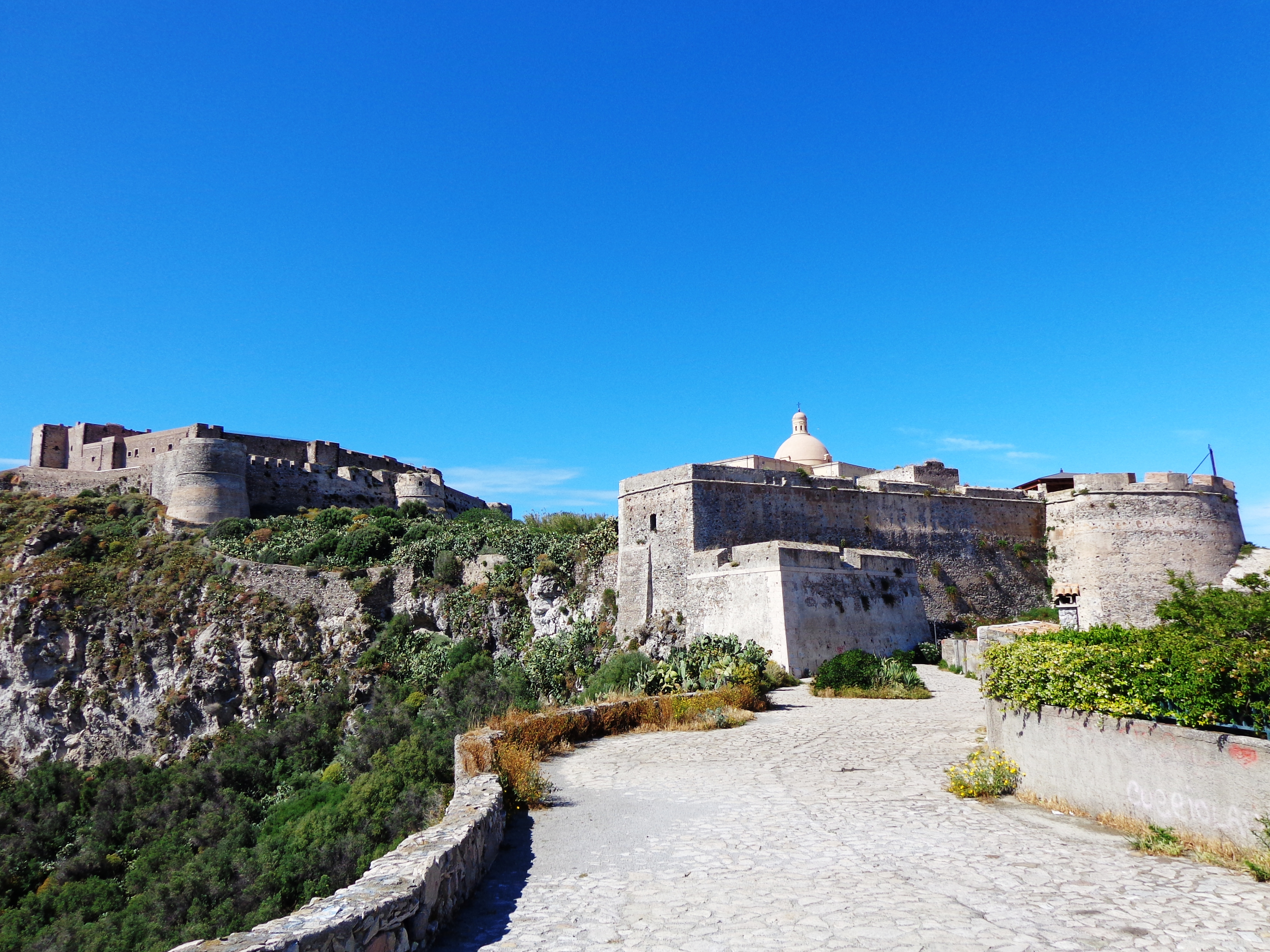 Veduta dal Rivellino di San Rocco